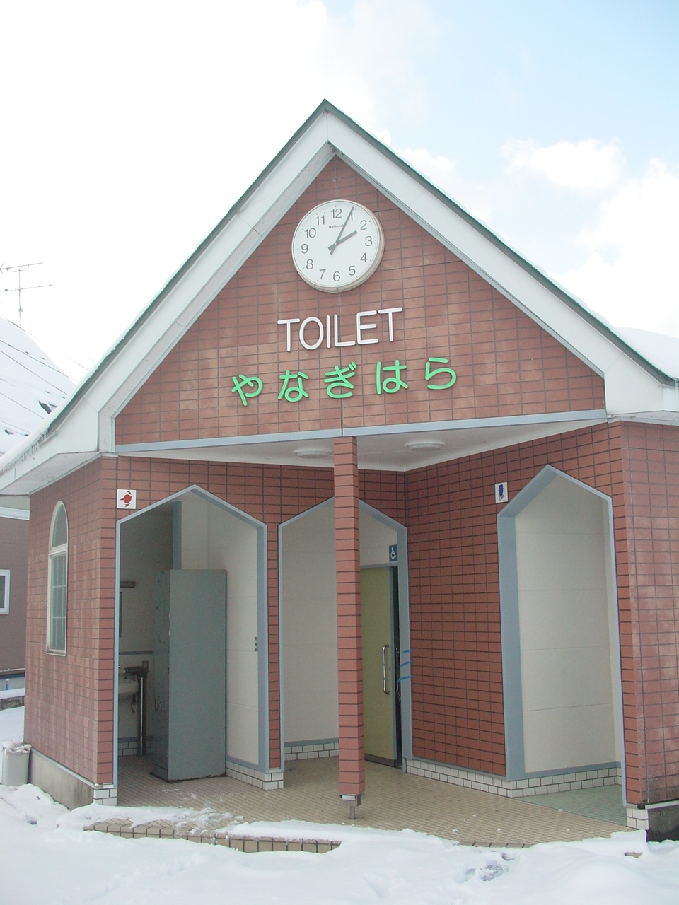 （柳原駅トイレ）